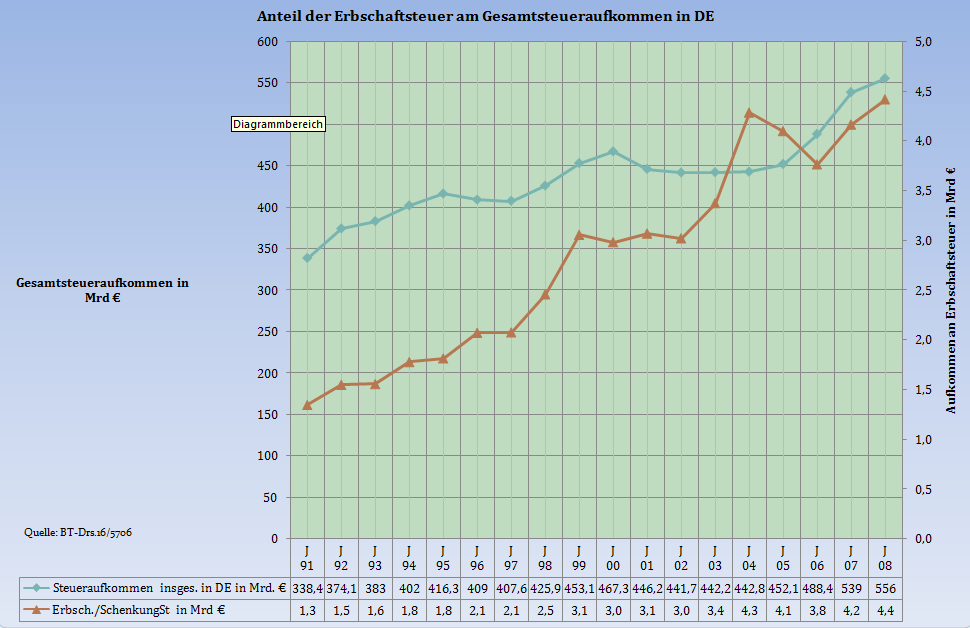 Entwicklung des Erbschaftsteueraufkommens in Deutschland Möglichkeiten zur Lizenzierung, bitte die nicht benötigten Varianten aus dem Code löschen